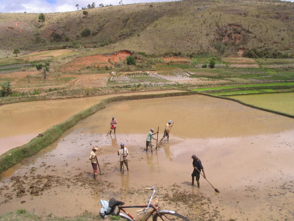 Travail en rizière, Madagascar (quelque part vers Ambositra) en 2006.